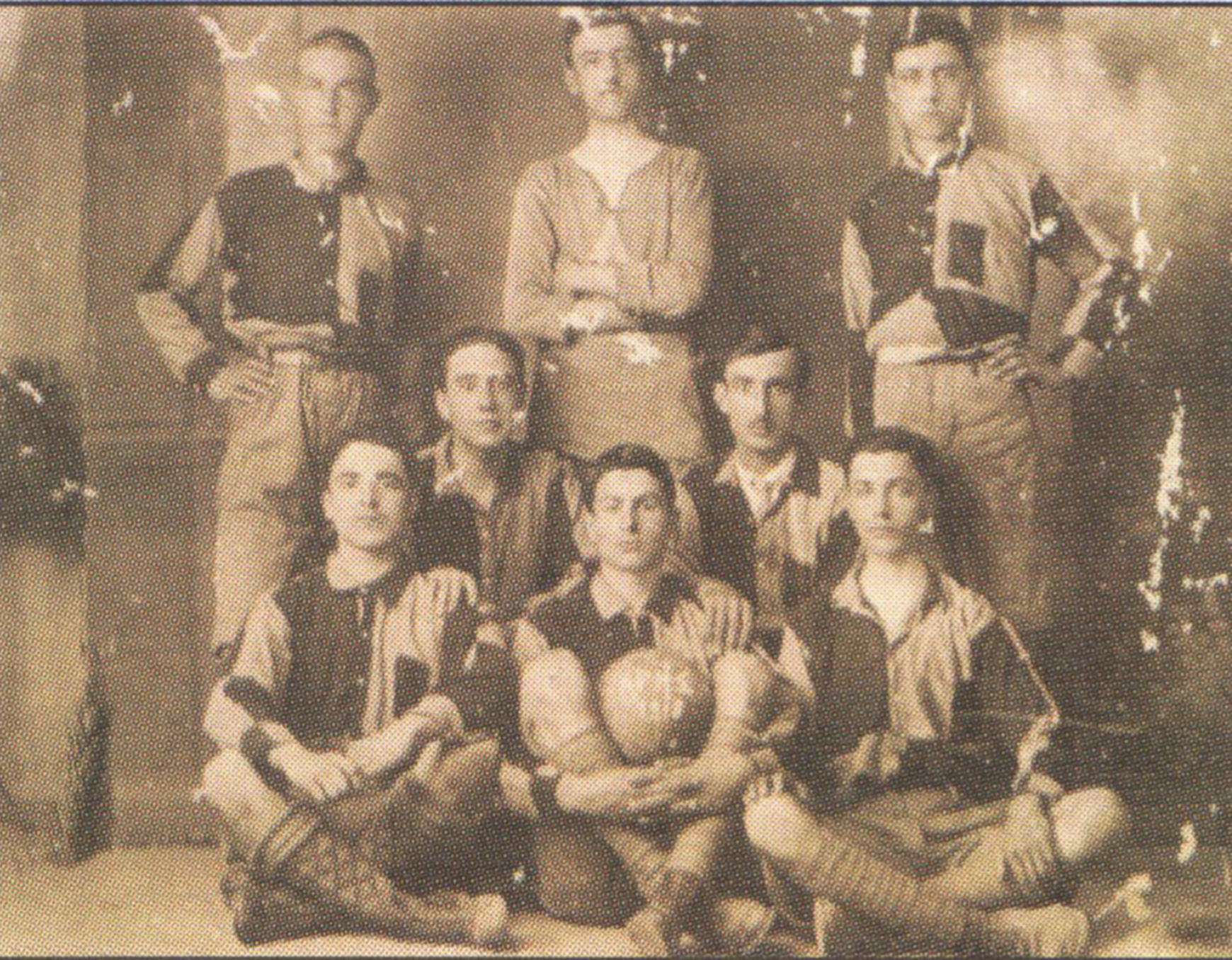 Αθλητές της ομάδας του Άρη το 1918